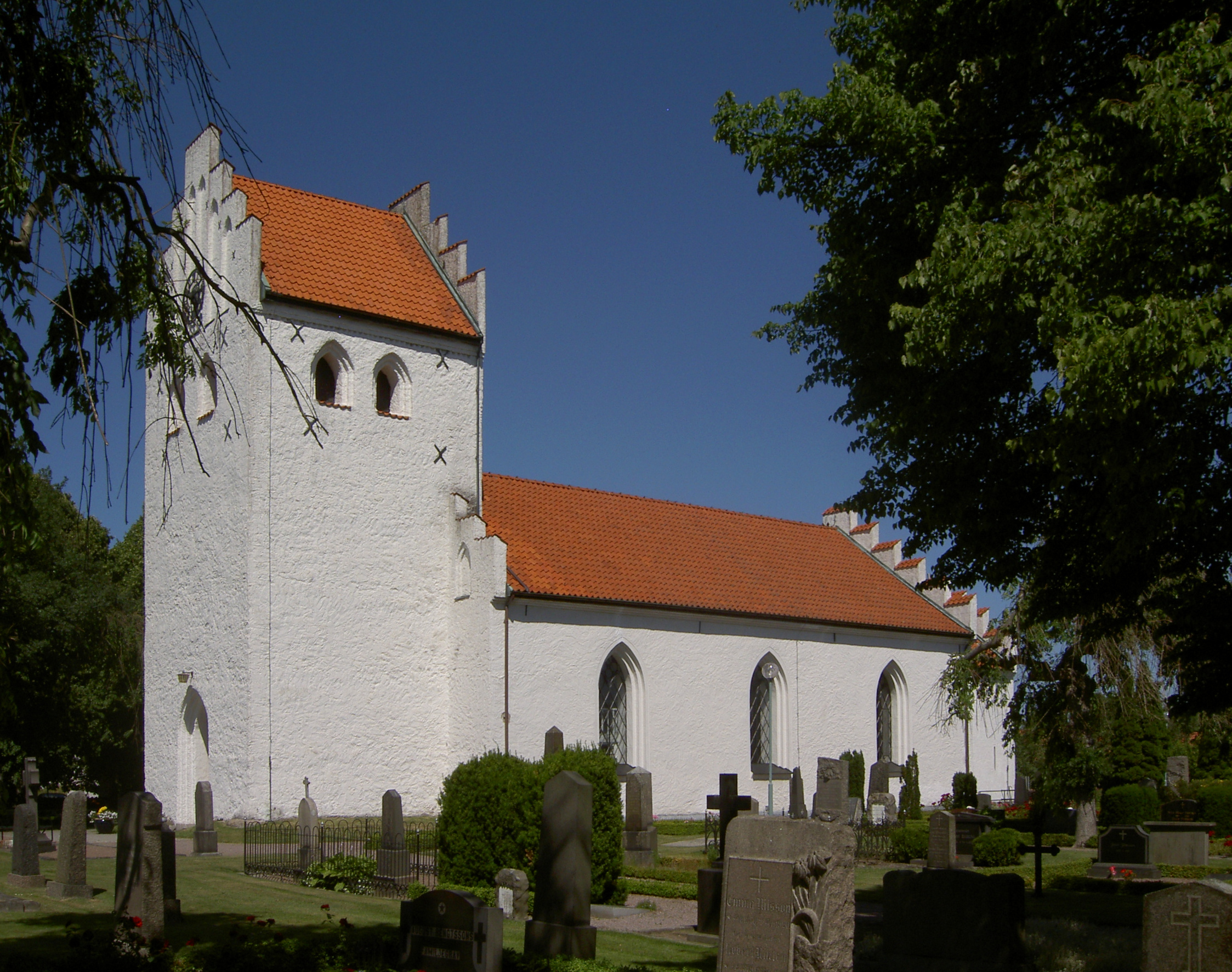 Rebbelberga kyrka